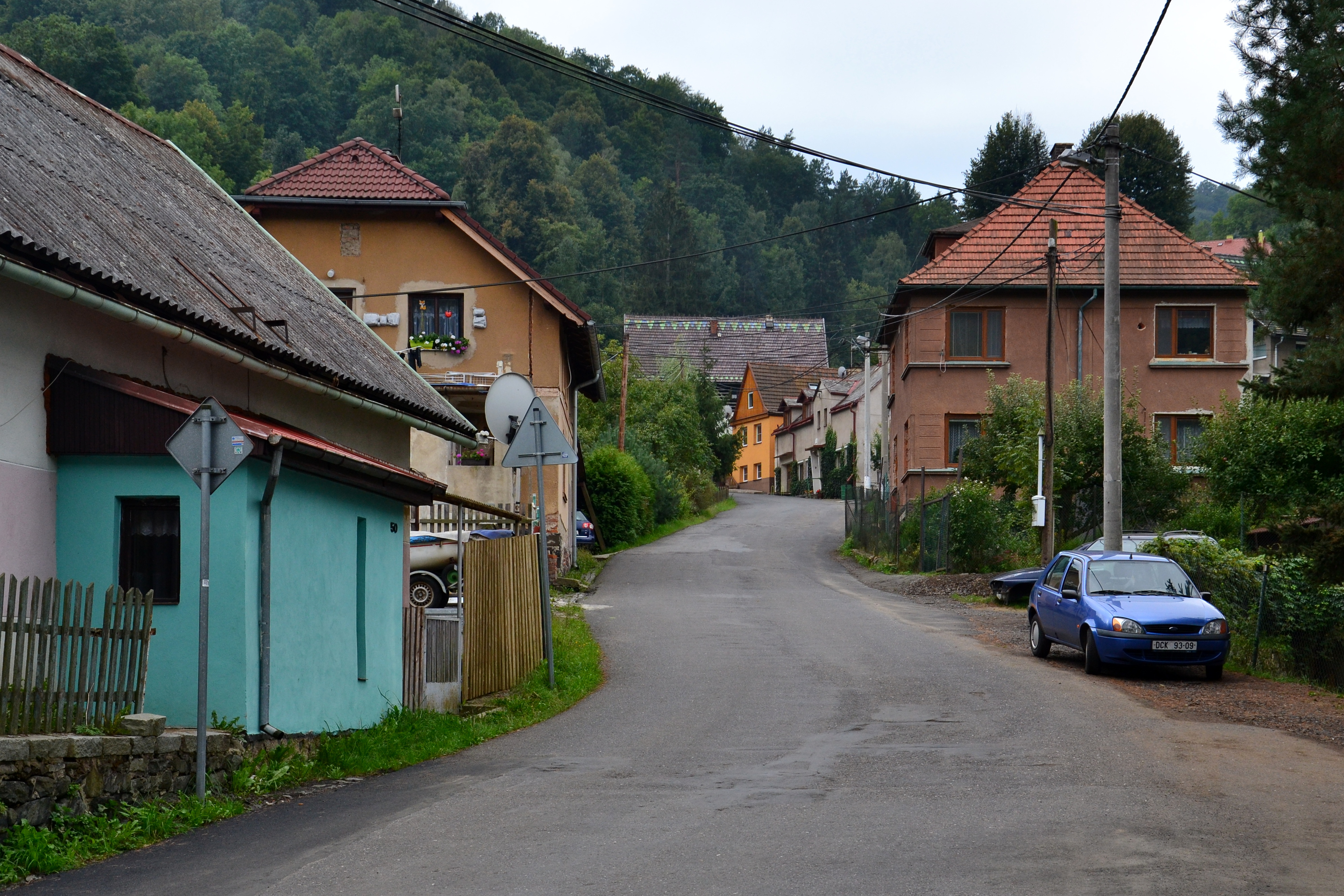 Nad železniční zastávkou